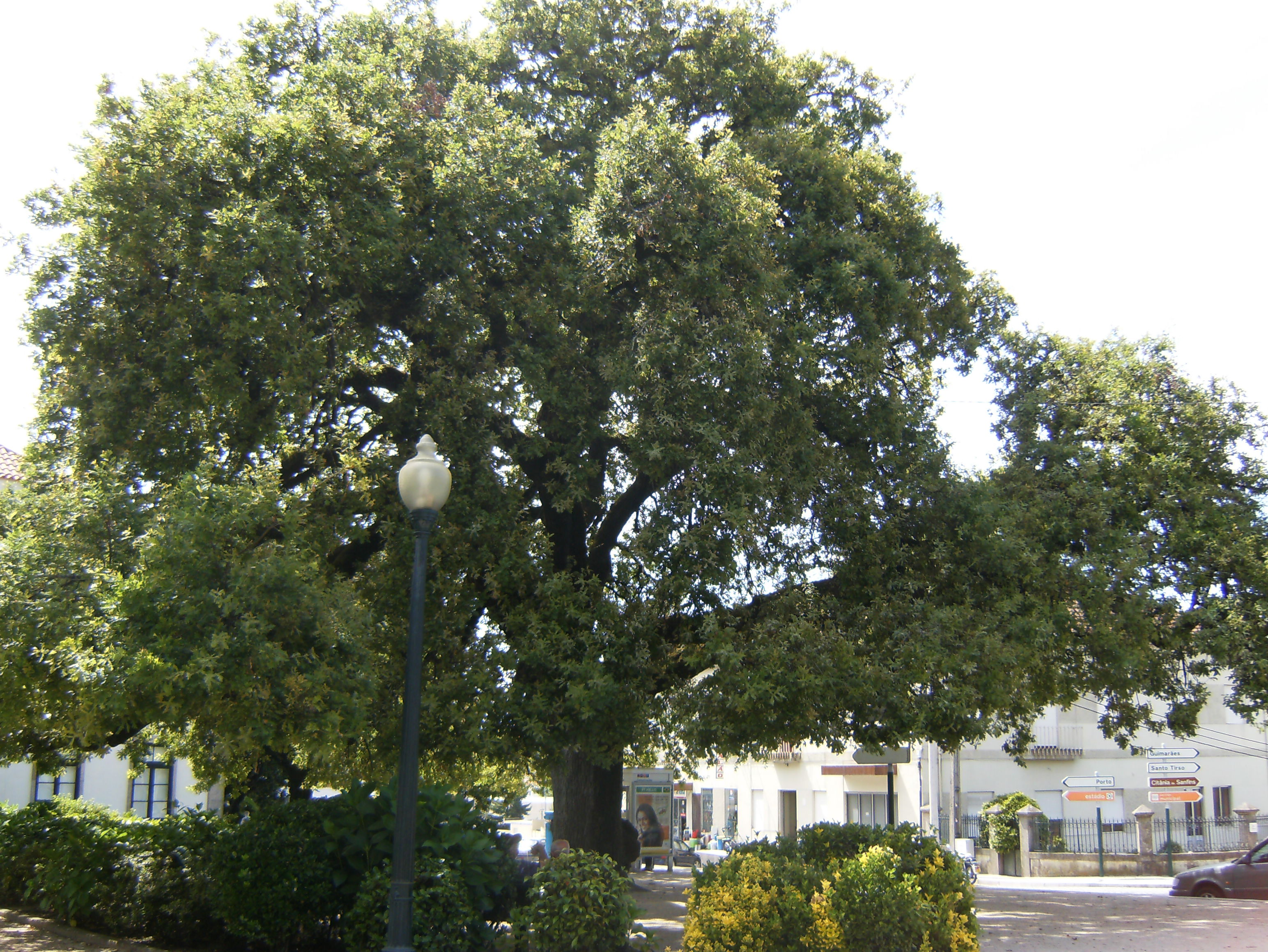 Carvalho alvarinho tri-centenário sito no Jardim Municipal de Paços de Ferreira